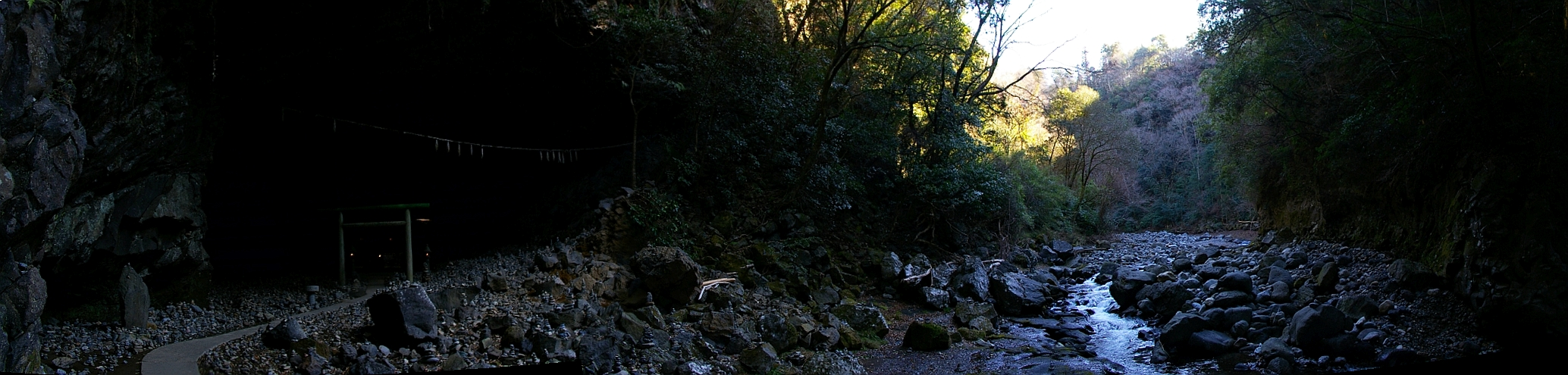 Amanoyasugawara in Amanoiwato shrine(Japan)